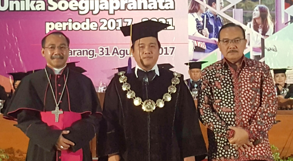 Pelantikan Rektor Unika